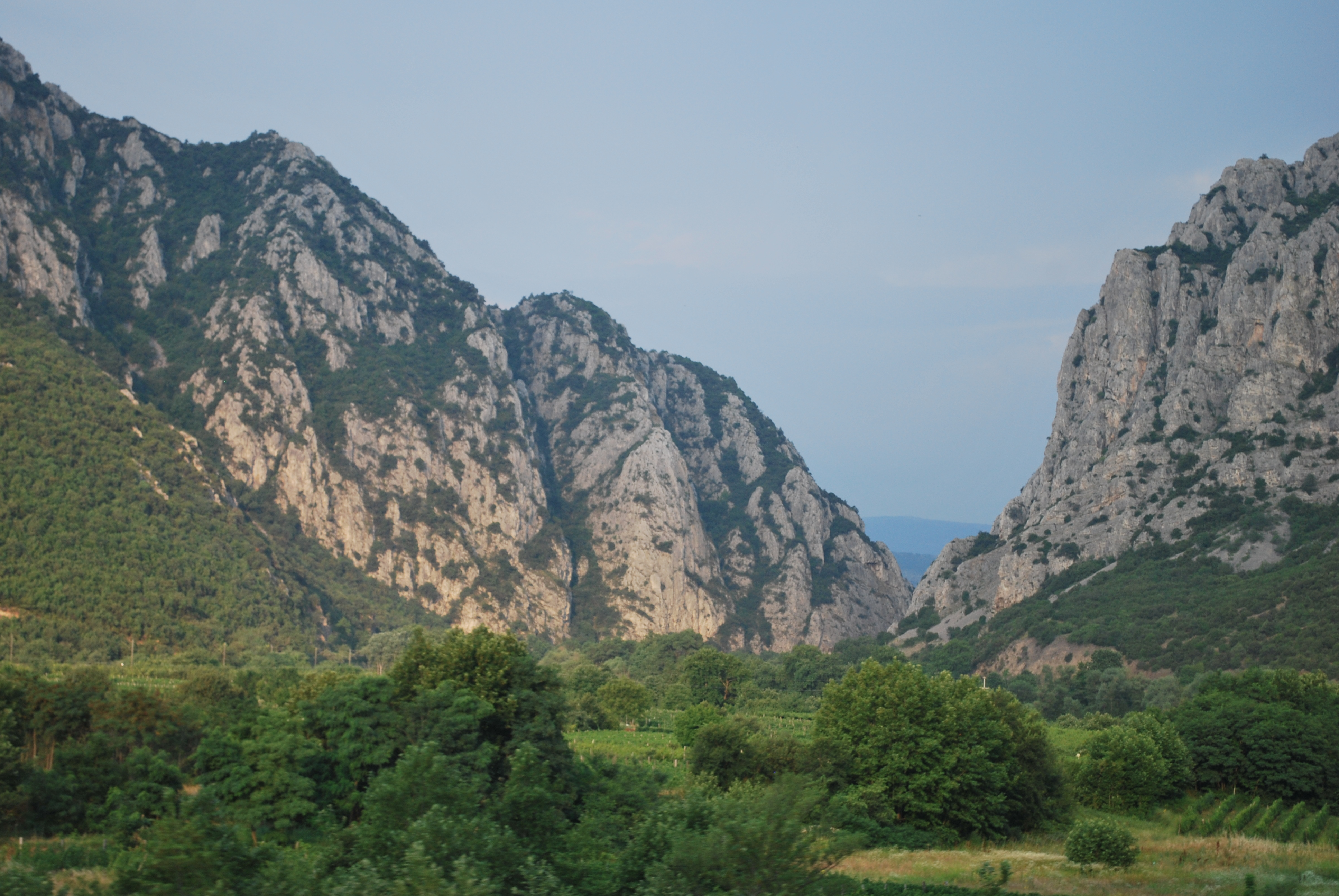 Demir Kapija Canyon